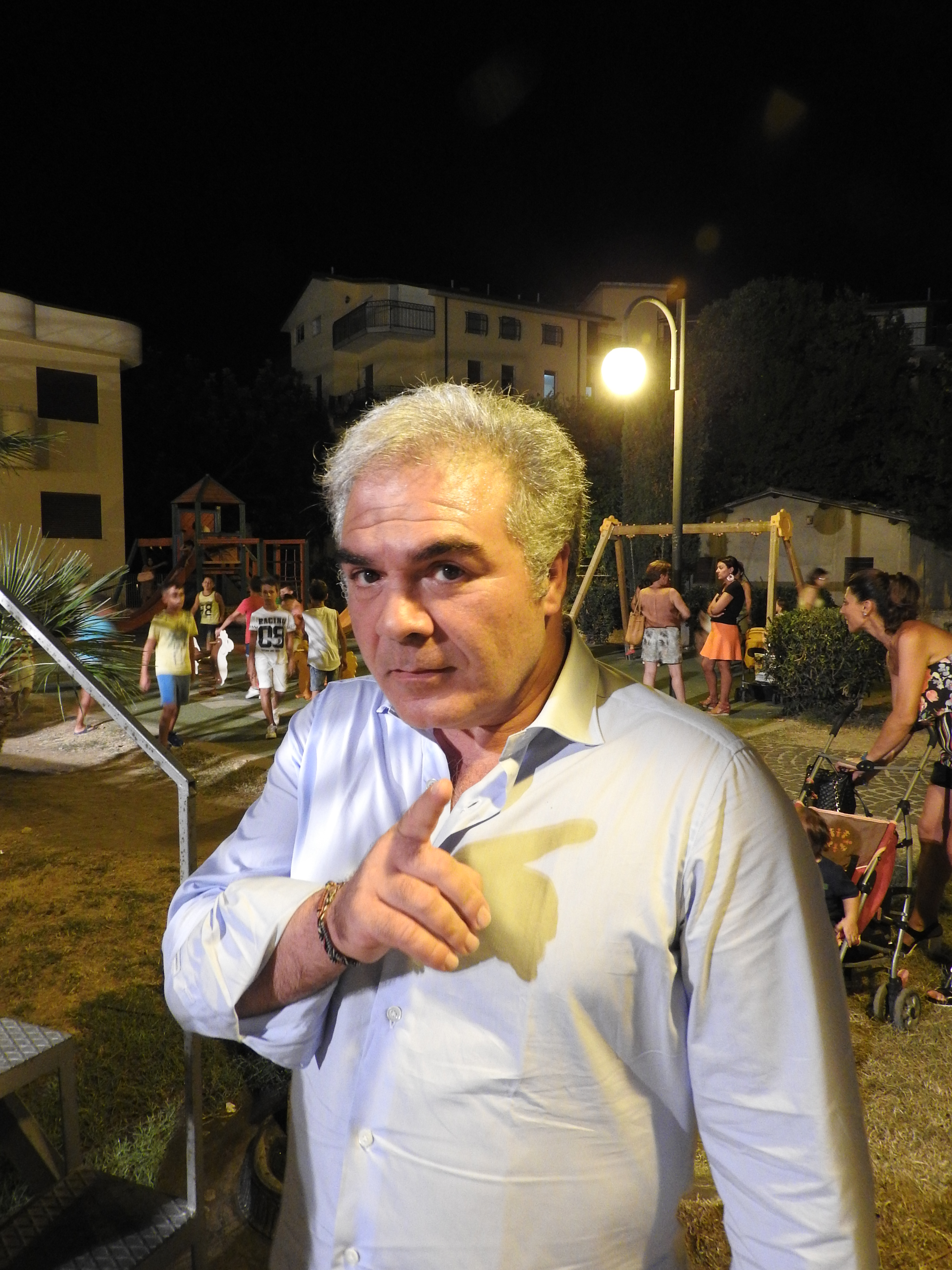 il comico, cabarettista e personaggio televisivo Franco Neri a Campora San Giovanni